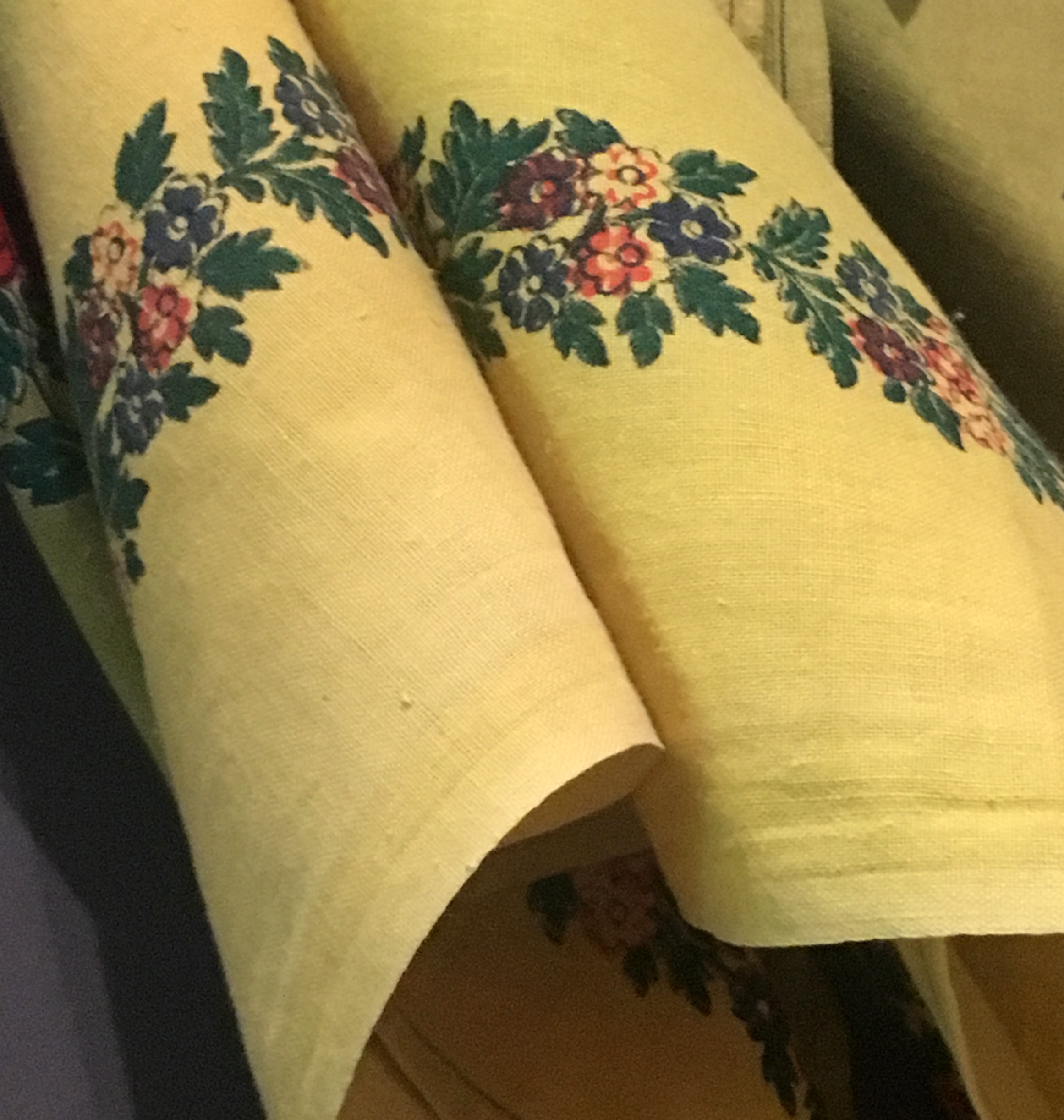 Cvetni motivi na žutoj šamiji ženske narodne nošnje izložene u Narodnom muzeju Kruševac